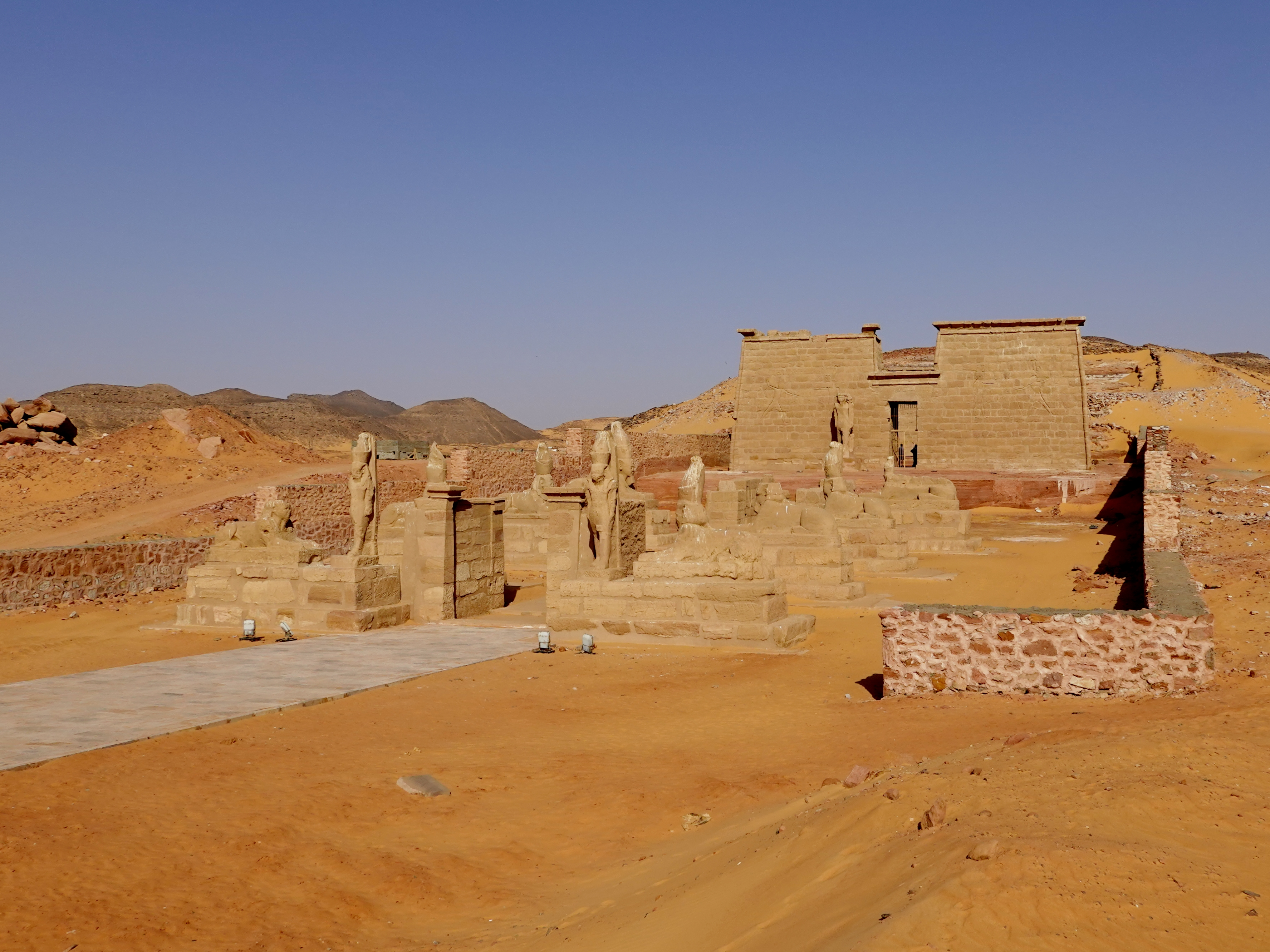 Tempel von Wadi es-Sebua am Nassersee, Ägypten